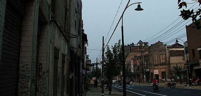 Xiangtan zhongshan rd湘潭中山路，清朝时繁盛的正街